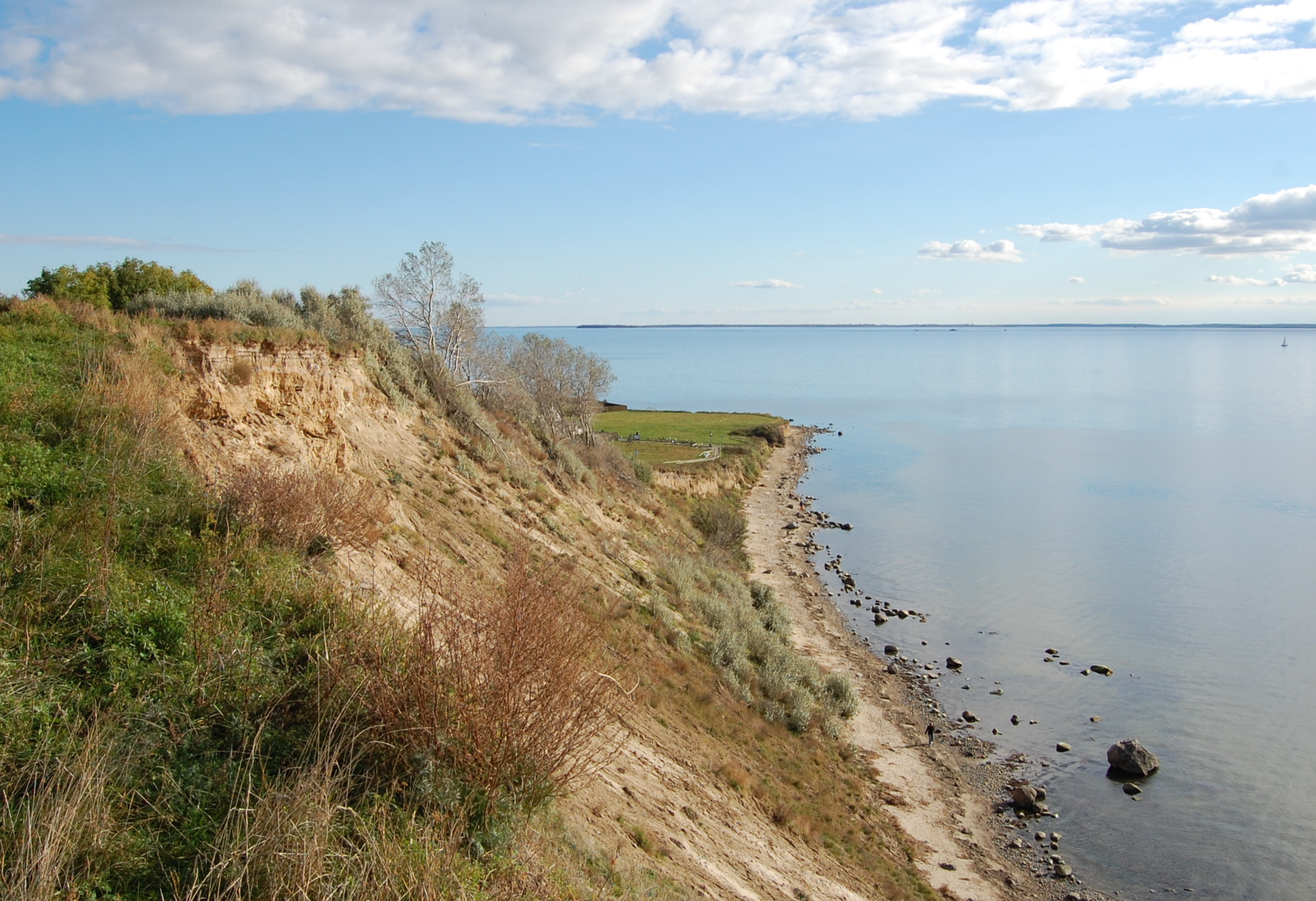 Steilküste am Südufer von Klein Zicker